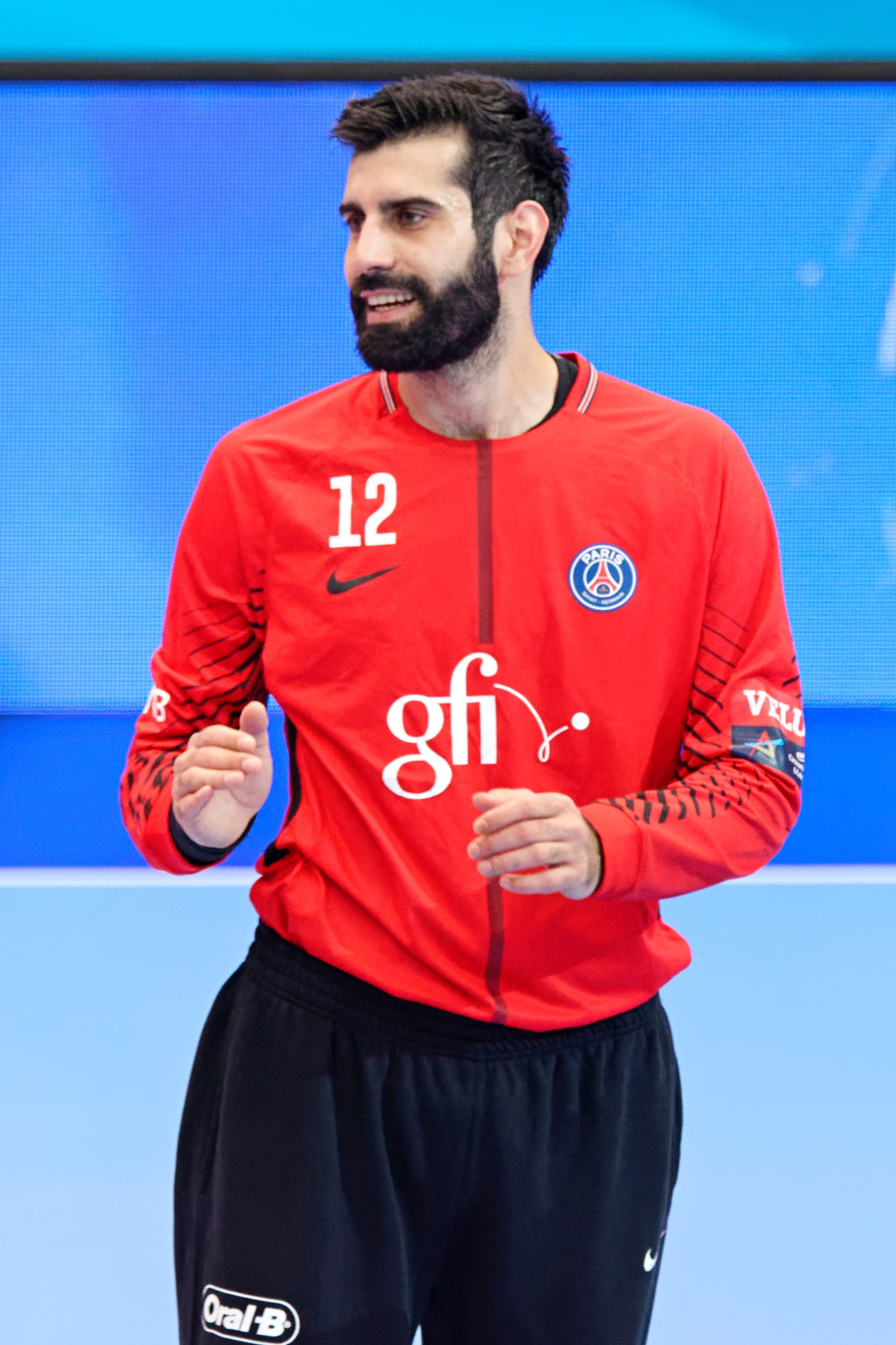 Match entre le PSG Handball et Meshkov Brest. A Coubertin, le 24 septembre 2017.